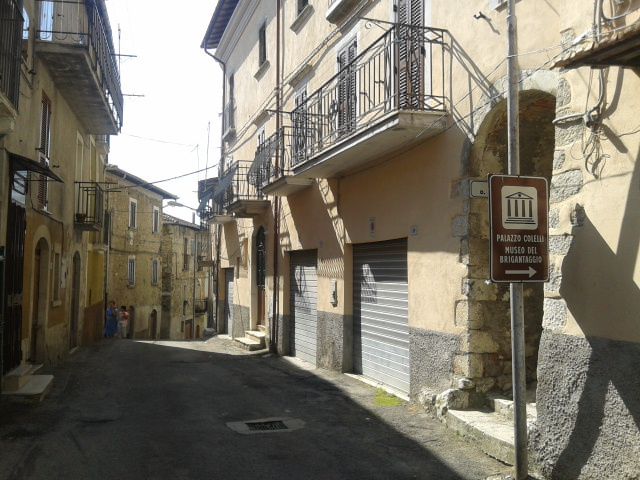 Centro storico di Sante Marie